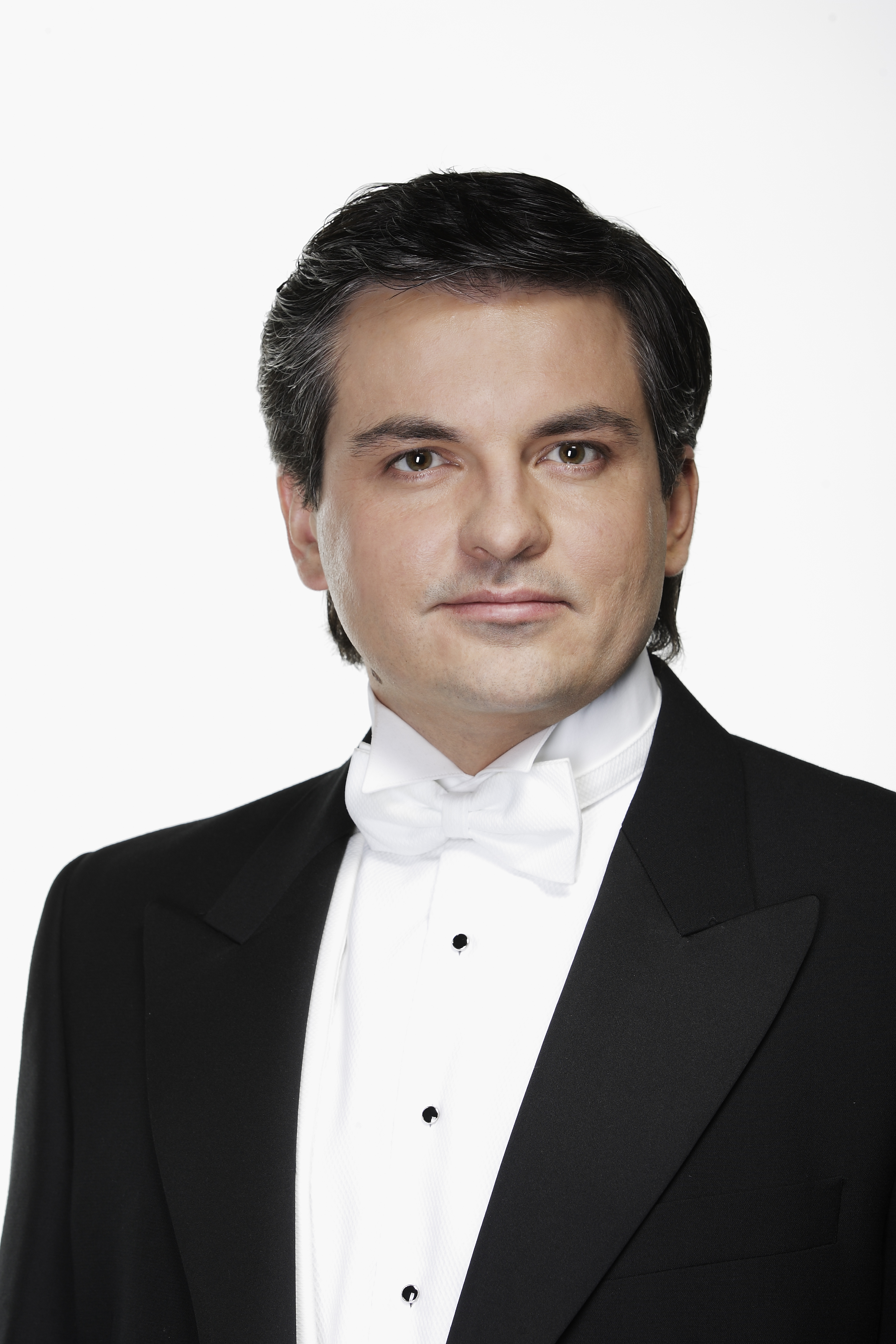 Ints Dālderis